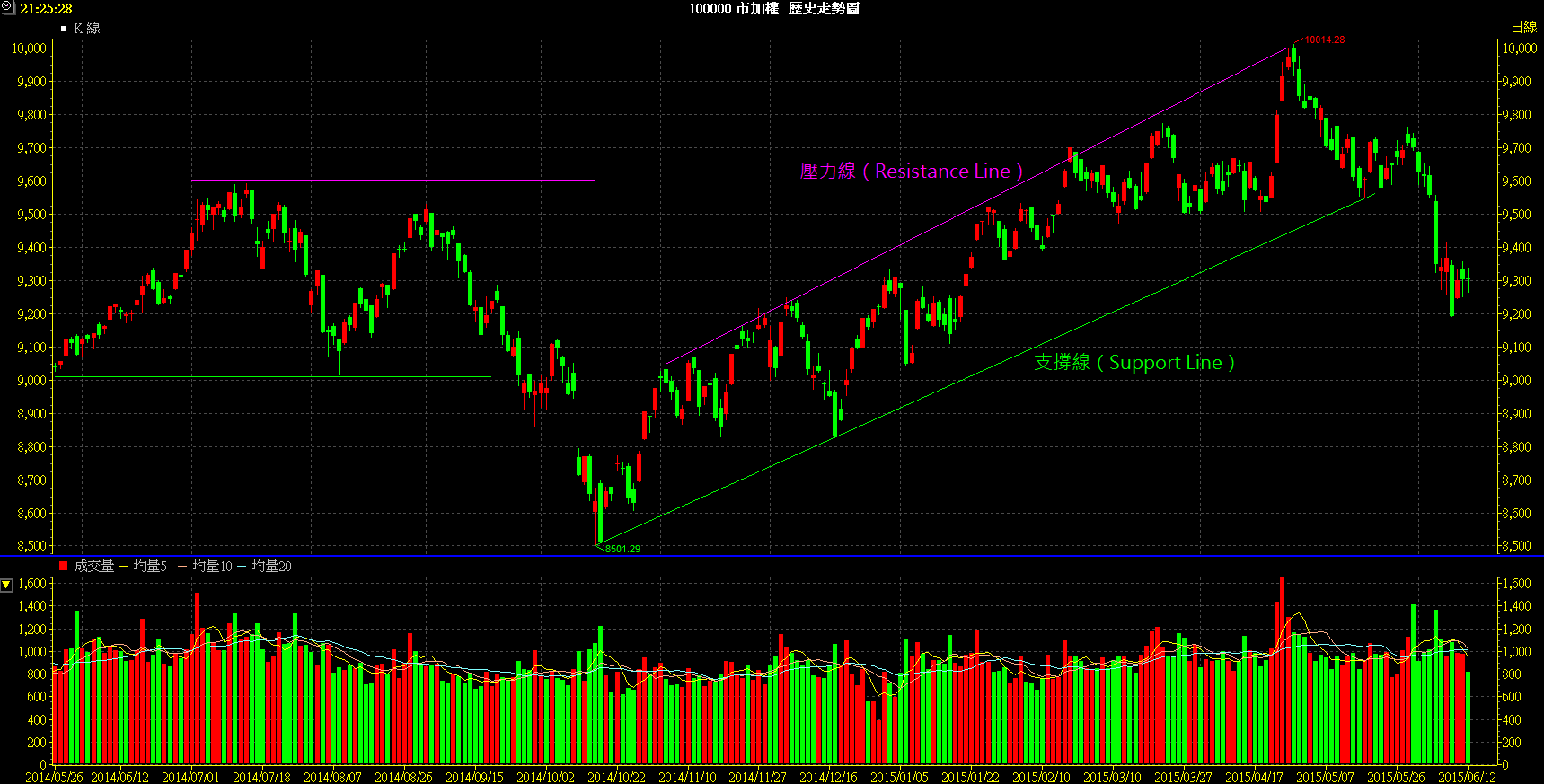 技術分析：壓力線與支撐線（元大寶來點金靈）